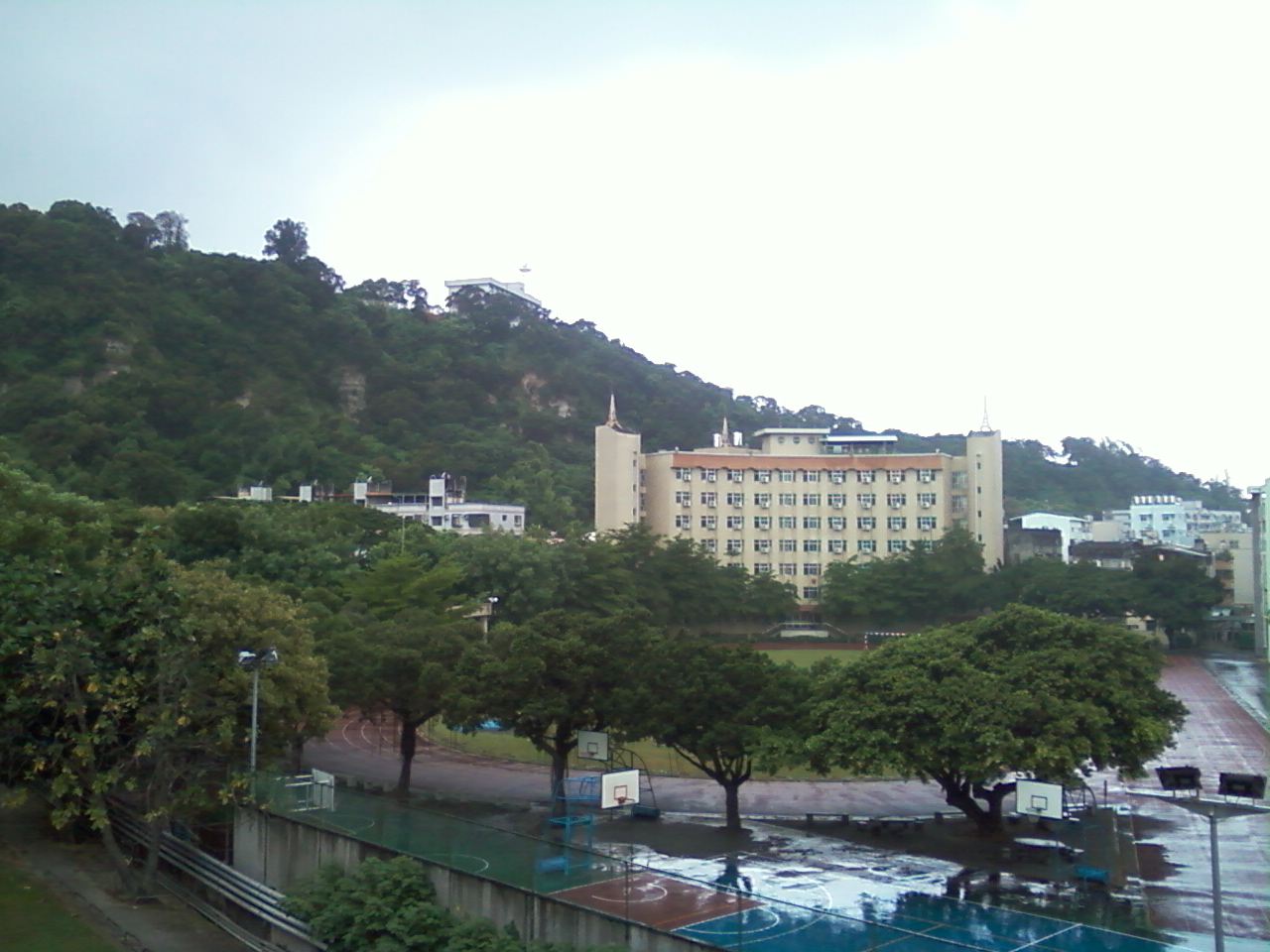 中文（台灣）: 國立彰化師範大學附屬高級工業職業學校